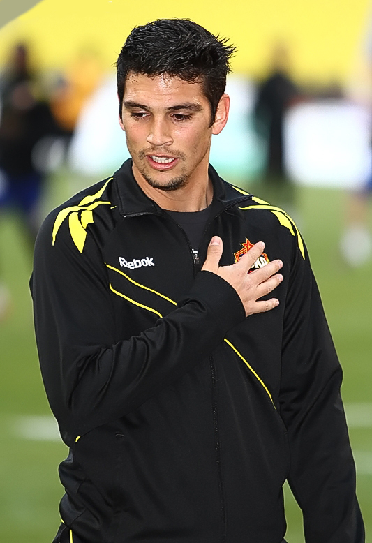 Марк Гонсалес